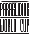 Paragliding World Cup Logo